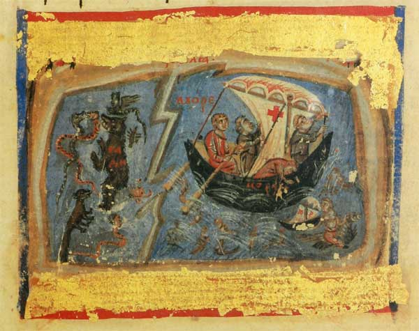 Српски (ћирилица): Минхенски псалтир, лист 133 recto, Псалам 103, 26 Земља и море